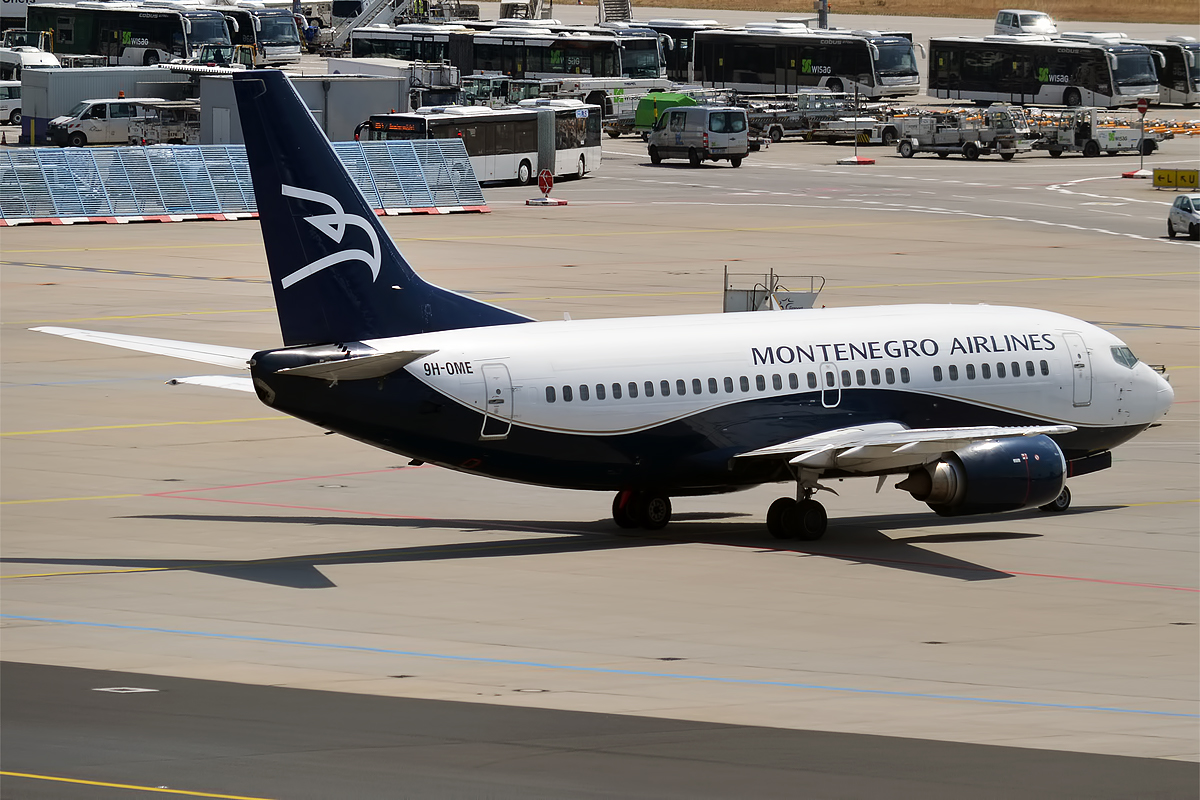 Montenegro Airlines, 9H-OME, Boeing 737-505